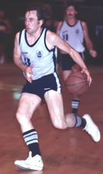 Foto de Carlos Alberto "el gallego" González. Jugador de basquetbol del Club de Gimnasia y Esgrima La Plata.